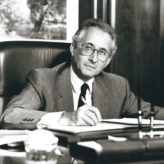 Il dott. Roberto Pontremoli nel suo studio.